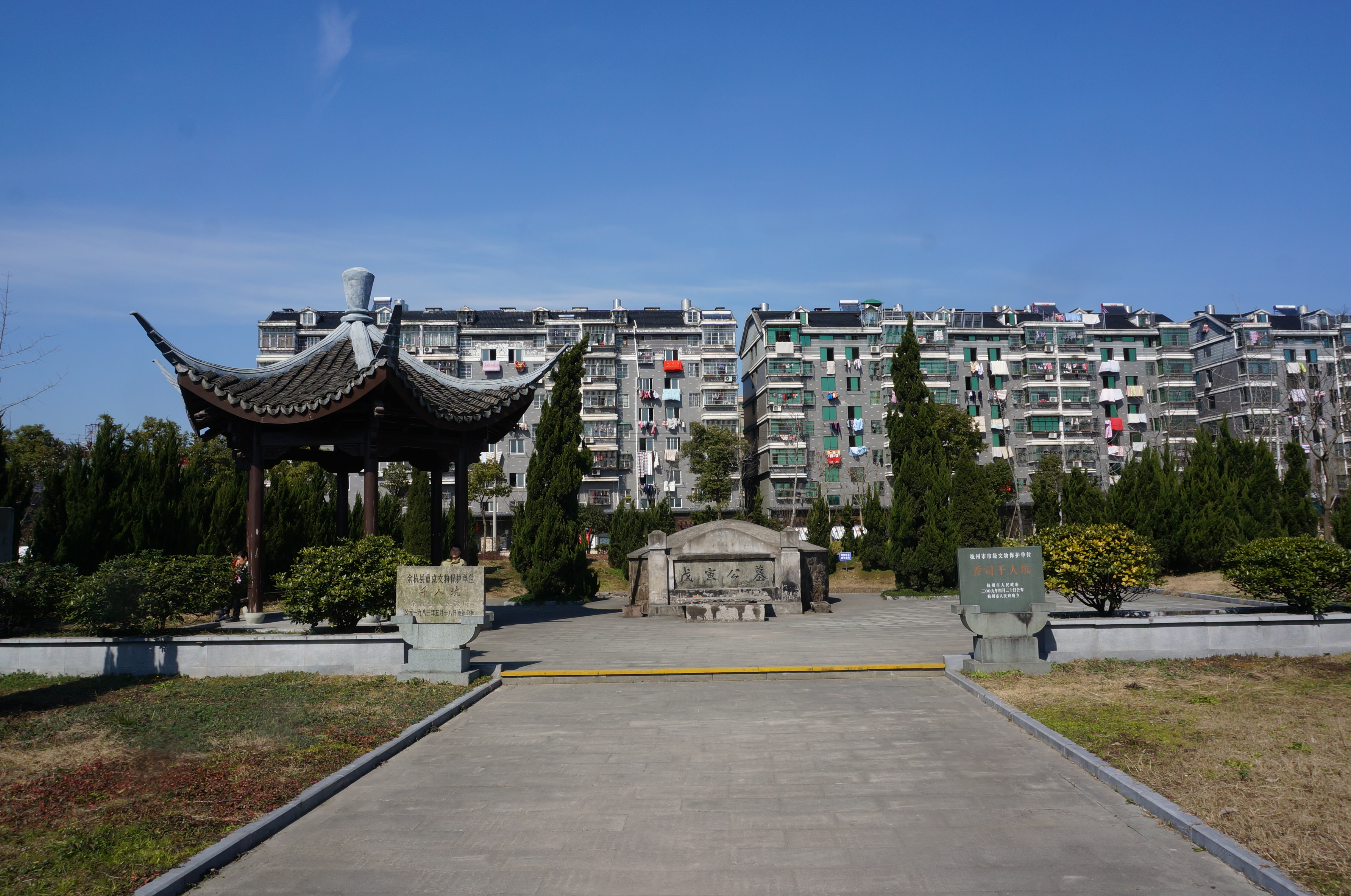 乔司千人坑，公墓与六角亭南面远景。